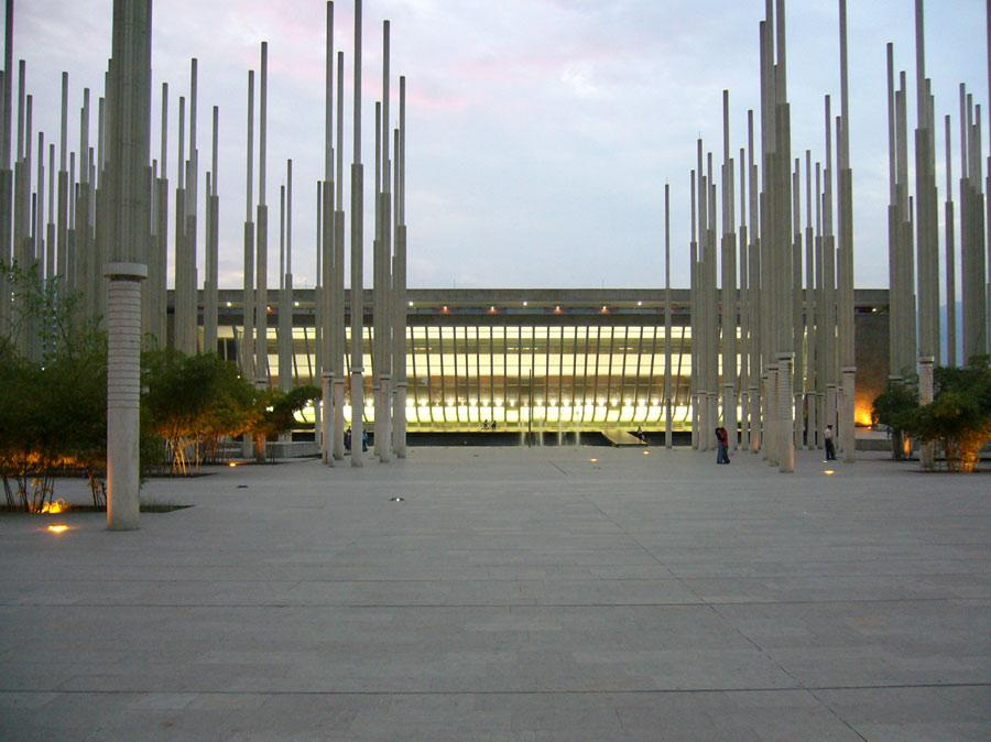 Biblioteca Temática EPM en la Plaza de Cisneros, Medellín (Colombia)